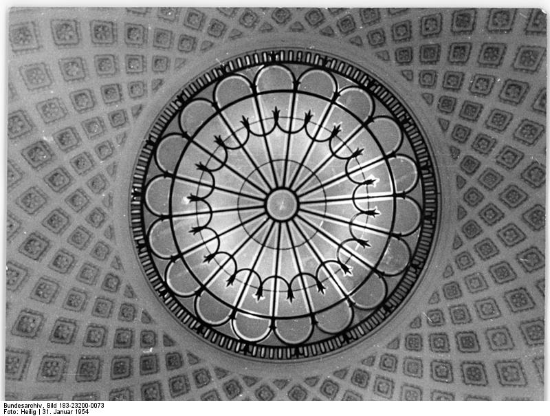 Berlin, Sowjetische Botschaft, Mittelsaal, Kuppel Zentralbild HeiligHei 31.1.1954 Die Beratungen der vier Aussenminister werden am 1.Februar 1954 in dem Gebäude des Hohen Komissars der UdSSR in Deutschland im demokratischen Sektor von Gross-Berlin,Unter den Linden,fortgesetzt.UBz.-Die herrliche,künstlerisch-ausgeführte Kuppel des Mittelsaals.